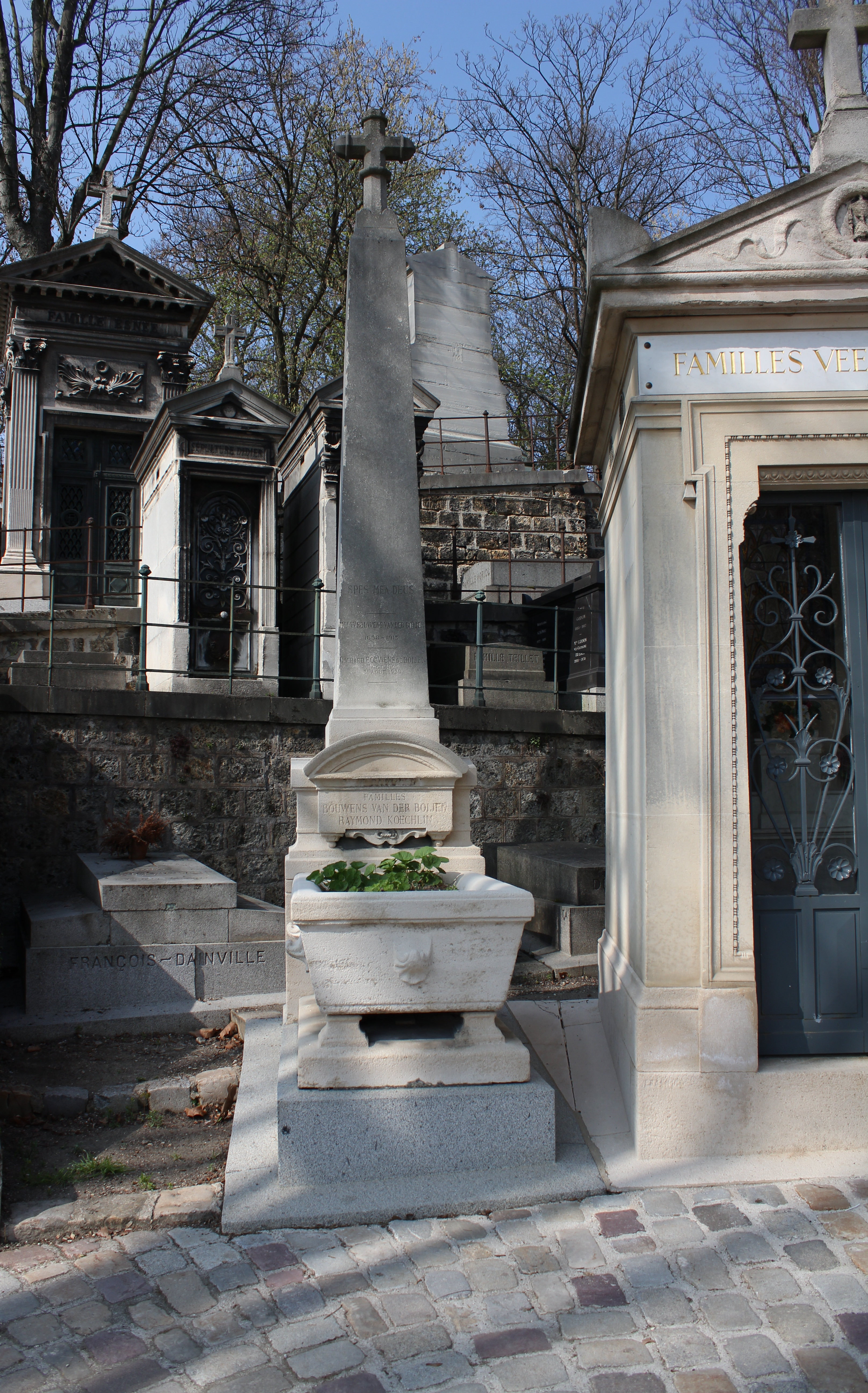 Sépulture de Richard Hermann Antoine Bouwens van der Boijen (1863-1939), architecte ; MME Bouwens van der Boijen (1838-1913), épouse de William Bouwens van der Boijen et mère de Richard Bouwens van der Boijen. Obélisque surmonté d'une croix.vue d'ensemble